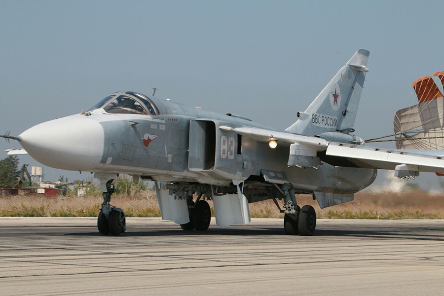 Боевые вылеты российской авиации с аэродрома «Хмеймим» для нанесения ударов по объектам террористов в Сирии